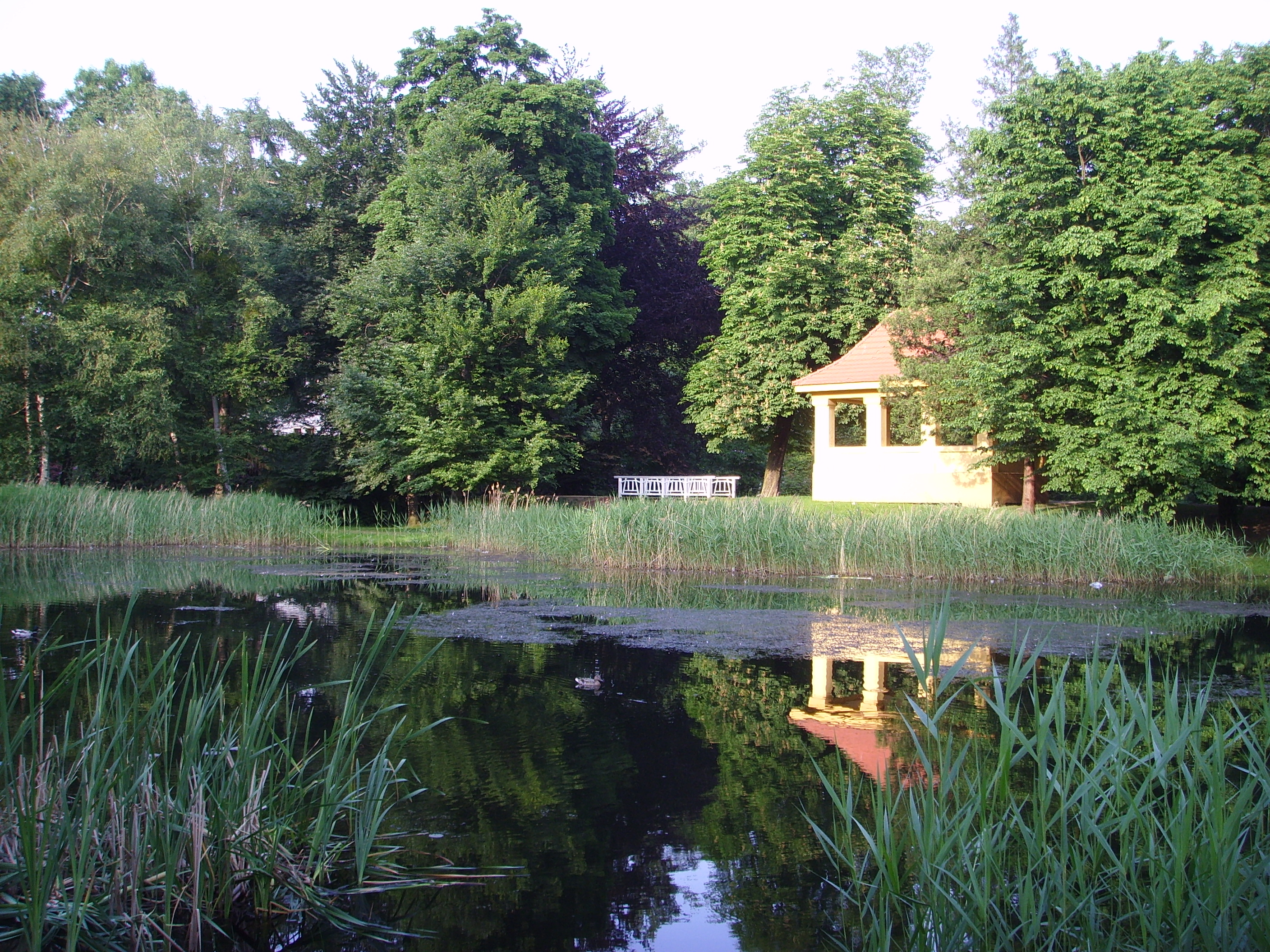 Schlosspark in Senftenberg, Blick auf den Pavillon